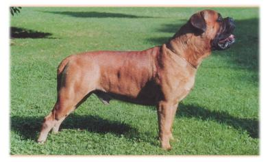 Bullmastiff Ch. Colombia Ecuador España Finlancia FCI Internacional Gibraltar Portugal XERXES DE CASTRO-CASTALIA, criado y propiedad de Christina de Lima-Netto "Castro-Castalia" Bullmatiffs